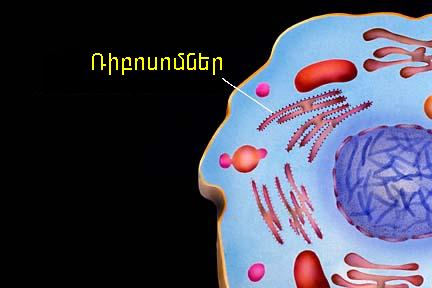 Ռիբոսոմ